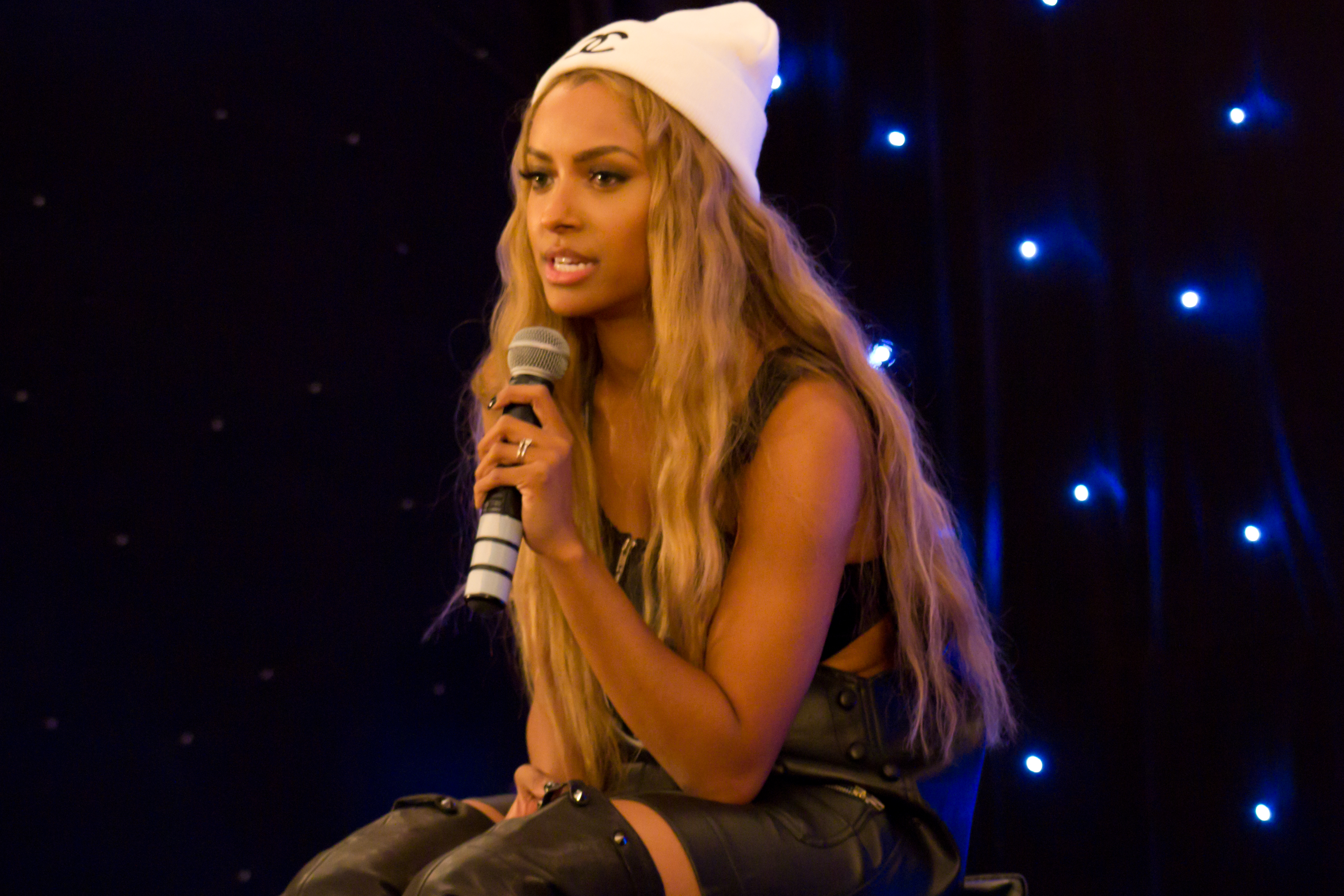 Kat Graham